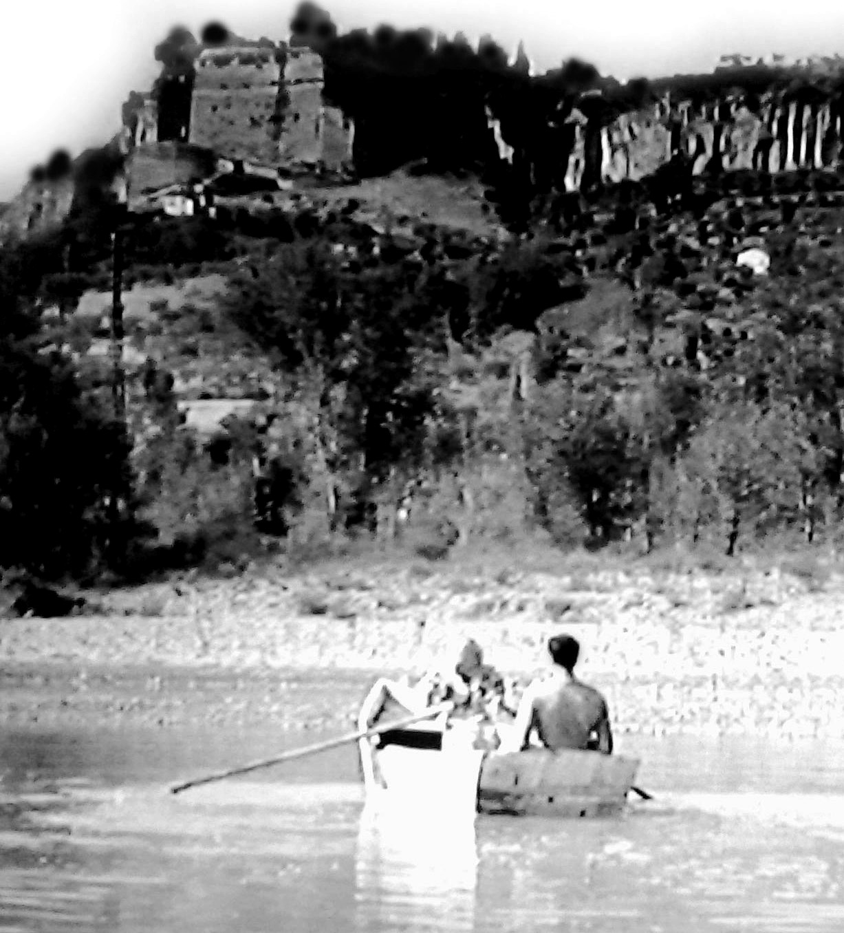 Una scena di Treno popolare, film del 1933 diretto da Raffaello Matarazzo.